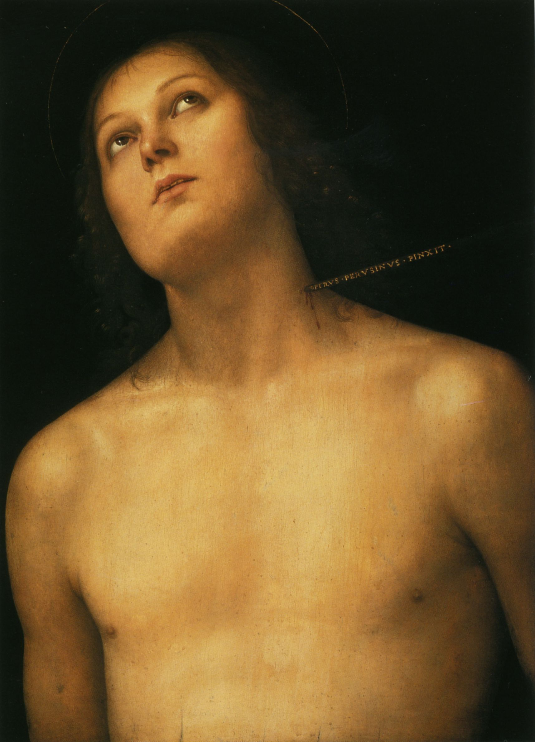 Pietro Perugino: San Sebastiano. Cat. no. 32 in Vittoria Garibaldi: Perugino. Catalogo completo. Octavo, Firenze 2000, ISBN 88-8030-091-1